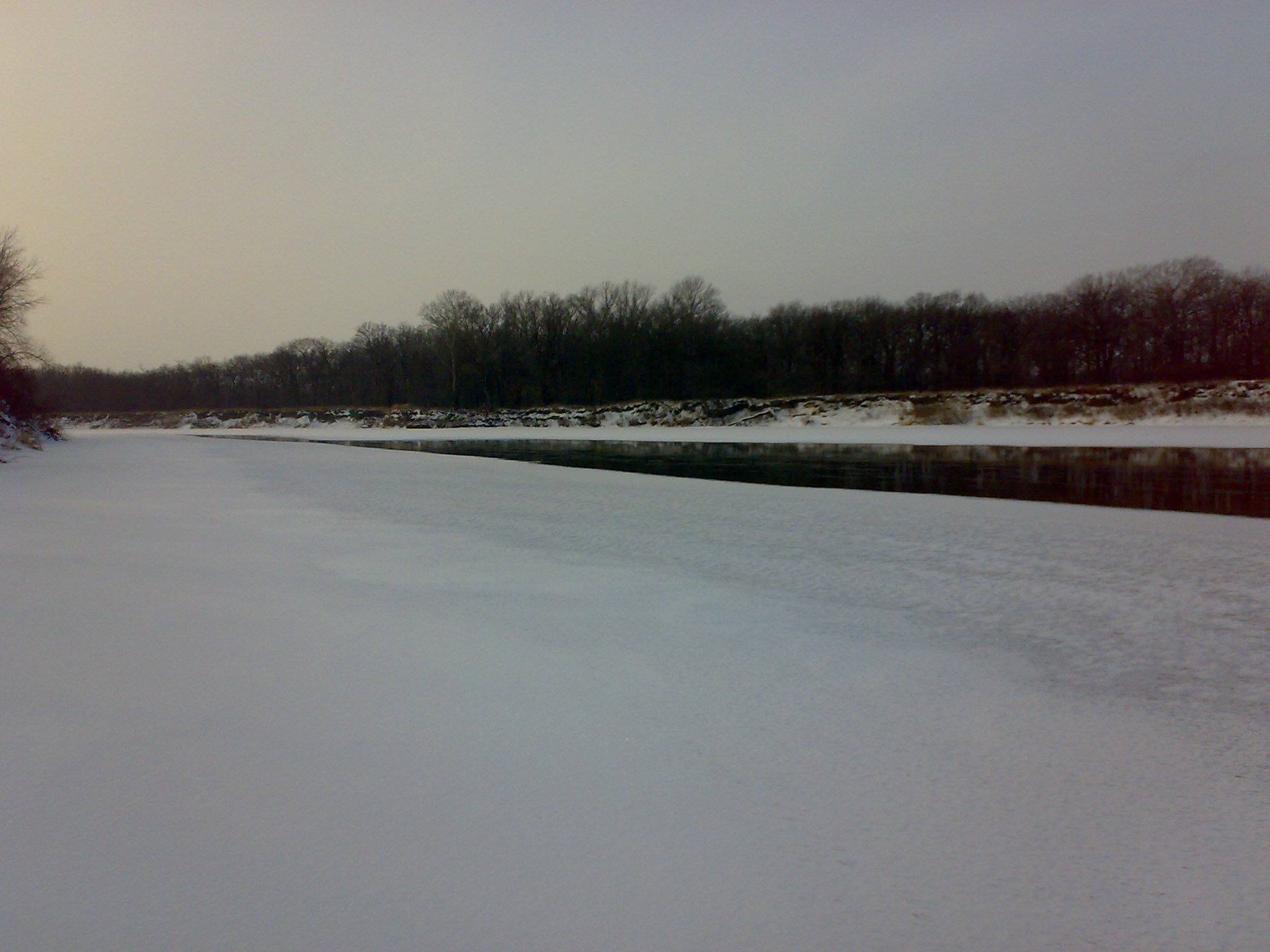 Хопер зимой